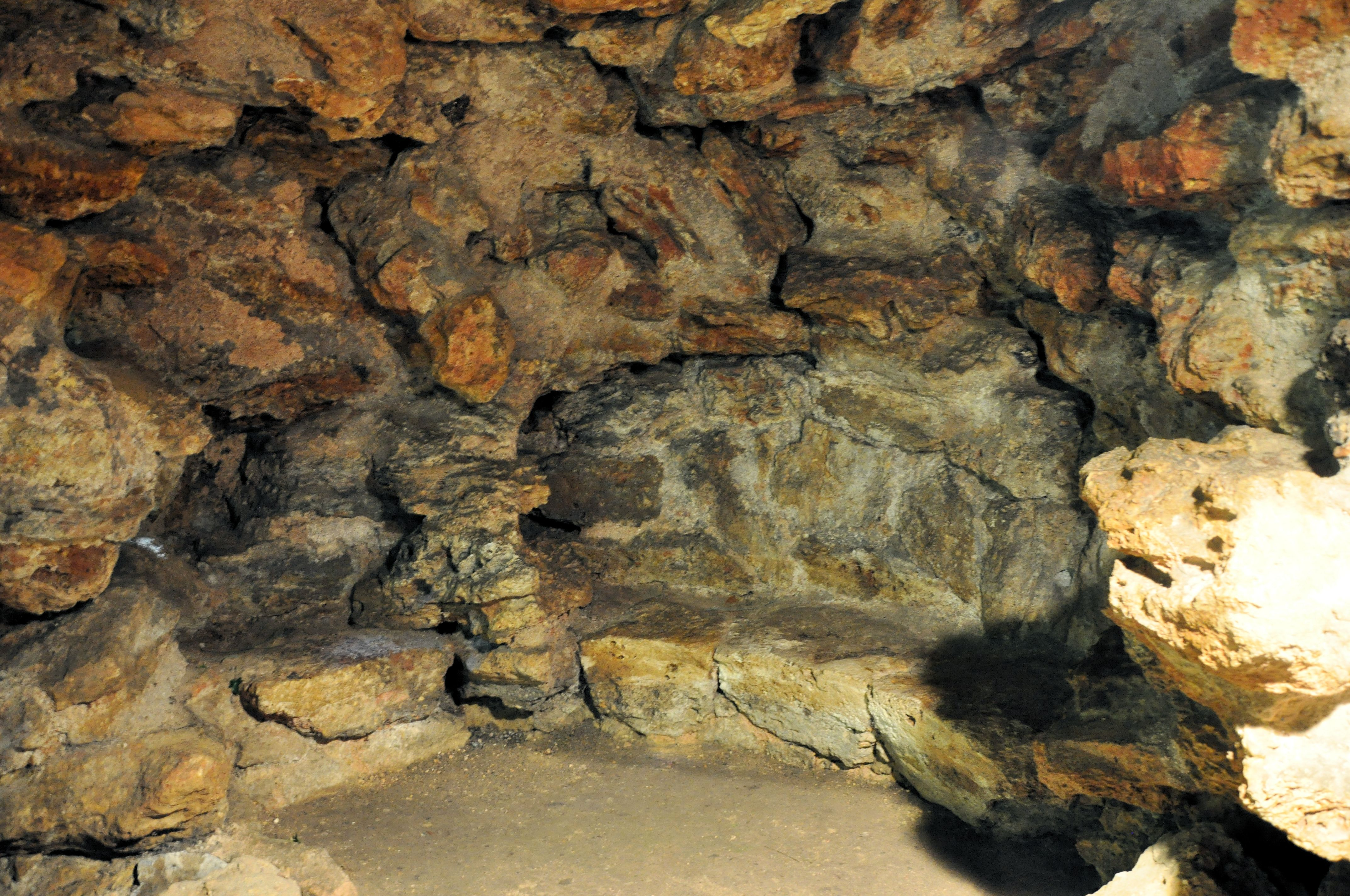 Petit Trianon - Intérieur de la grotte de Marie-Antoinette dans le Jardin anglais